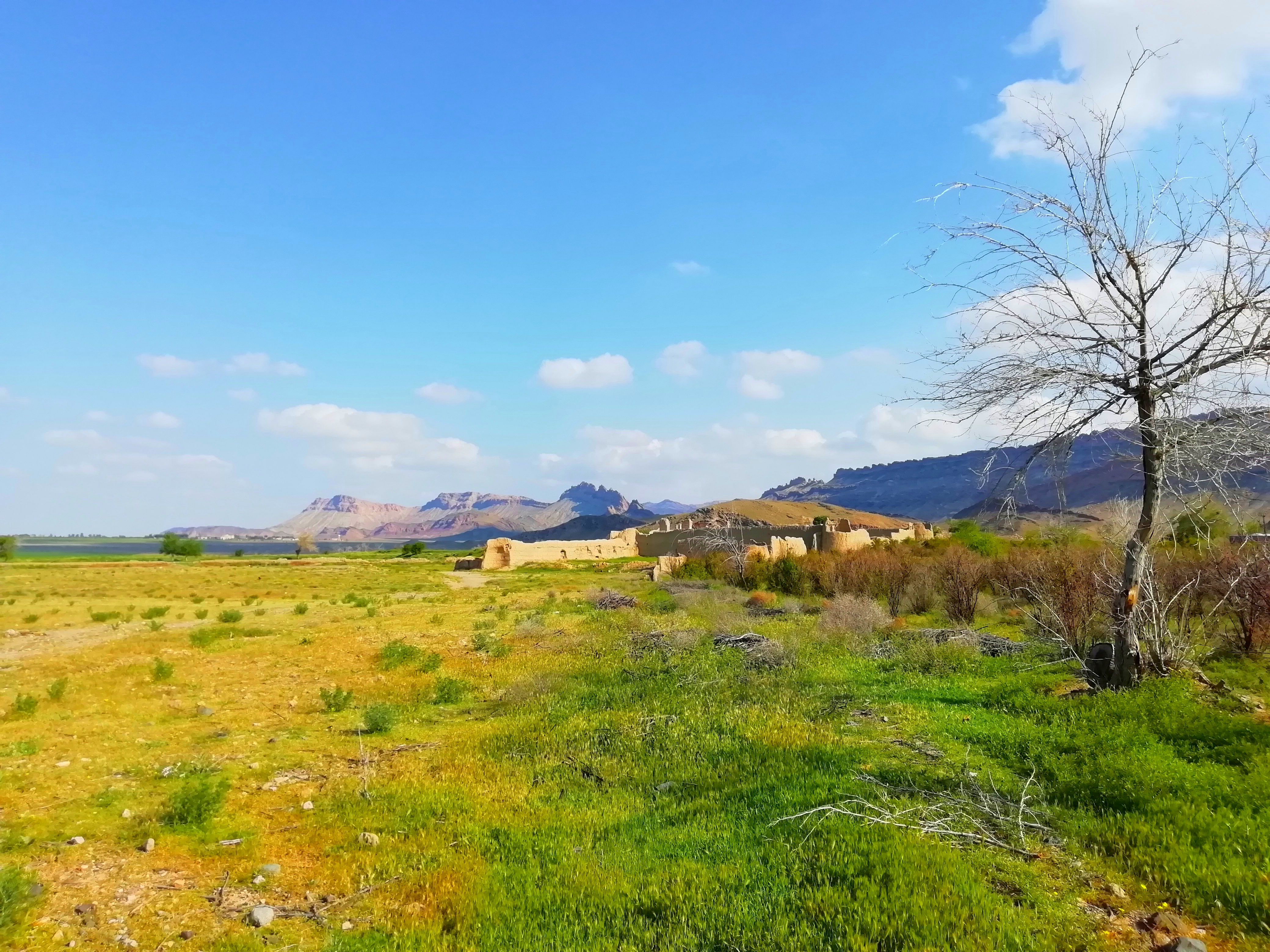 بقایای یک کاروان سرای قدیمی در نزدیکی روستای زنبورک قم